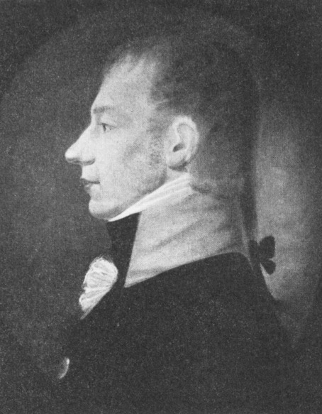 Pastellzeichung Christian Benjamin Preußler